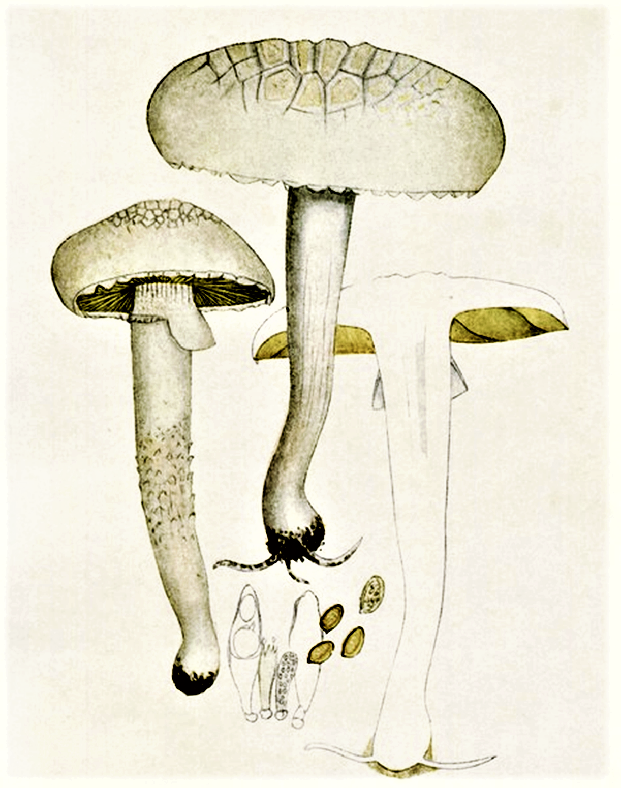 Giacomo Bresadola: Pholiota dura (Bolton, 1788) Kumm. (1871), heute Agrocybe dura (Bolton, 1788) Singer (1936)